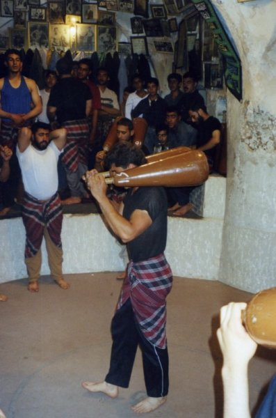 Exercice d'assouplissement aux quilles de bois